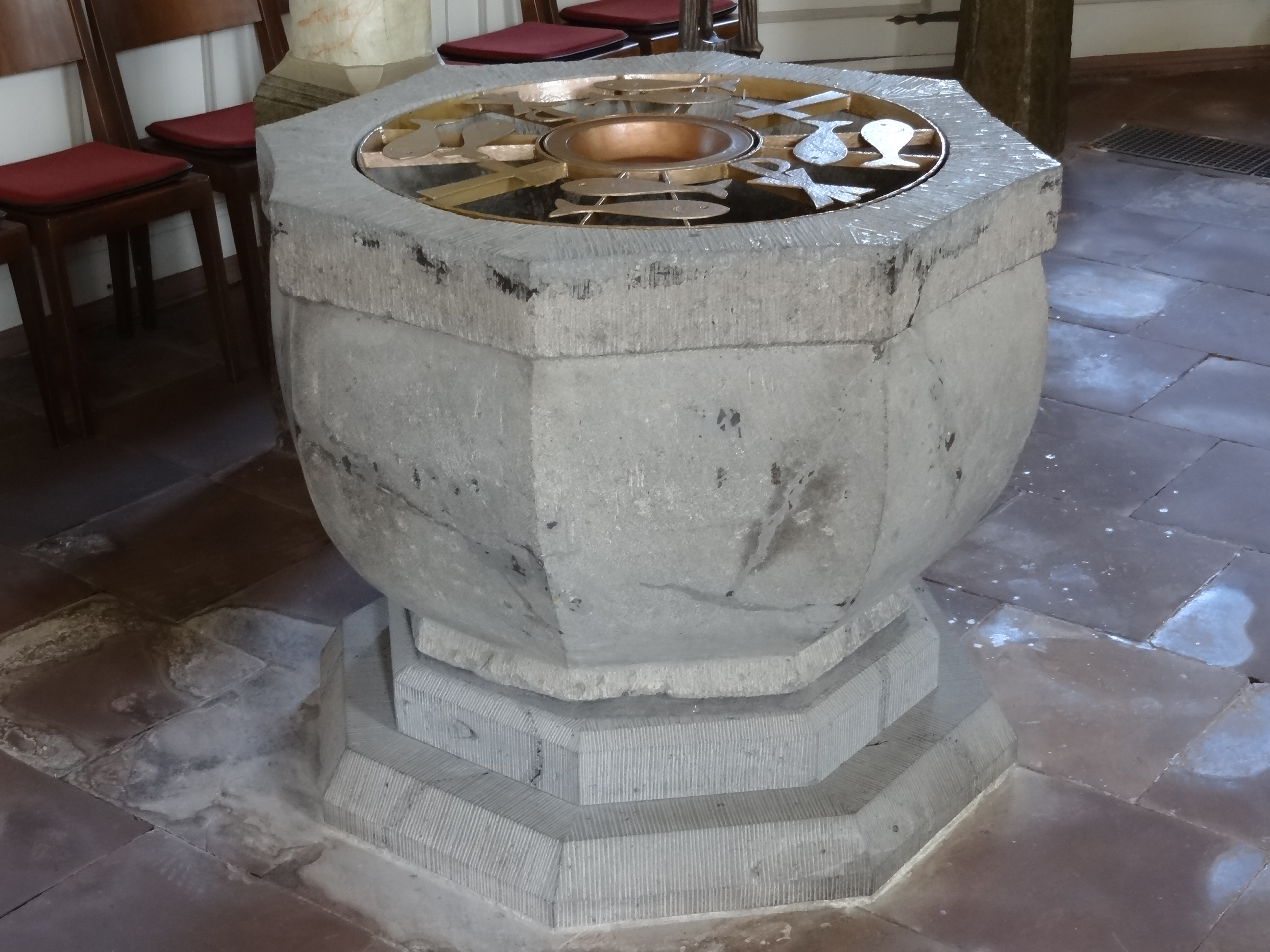 Kirche Wirberg